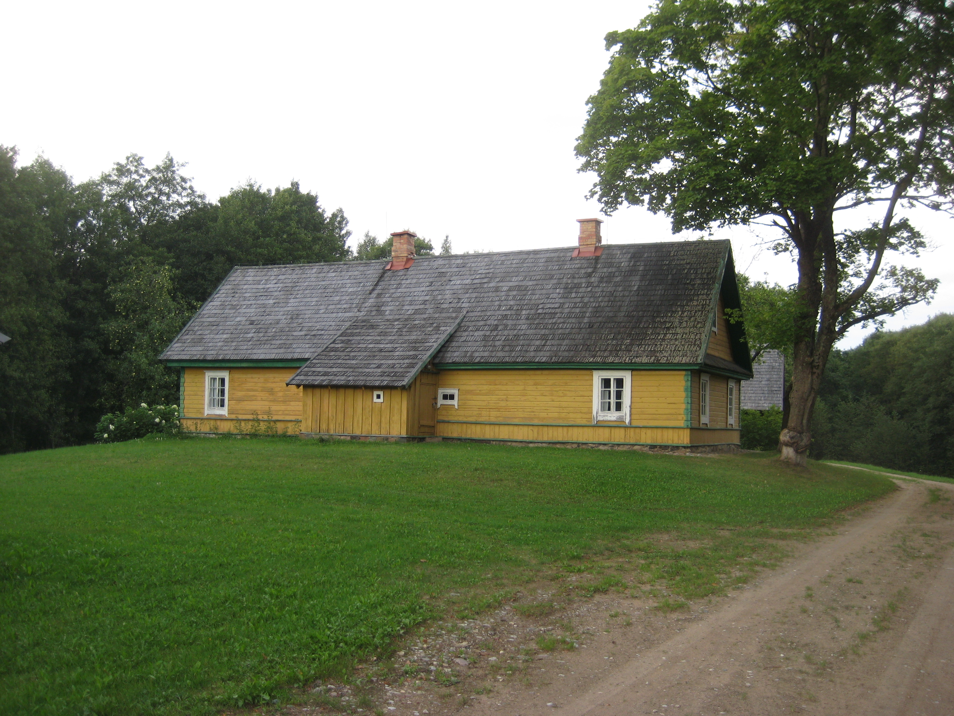 Daugailių sen., Lithuania